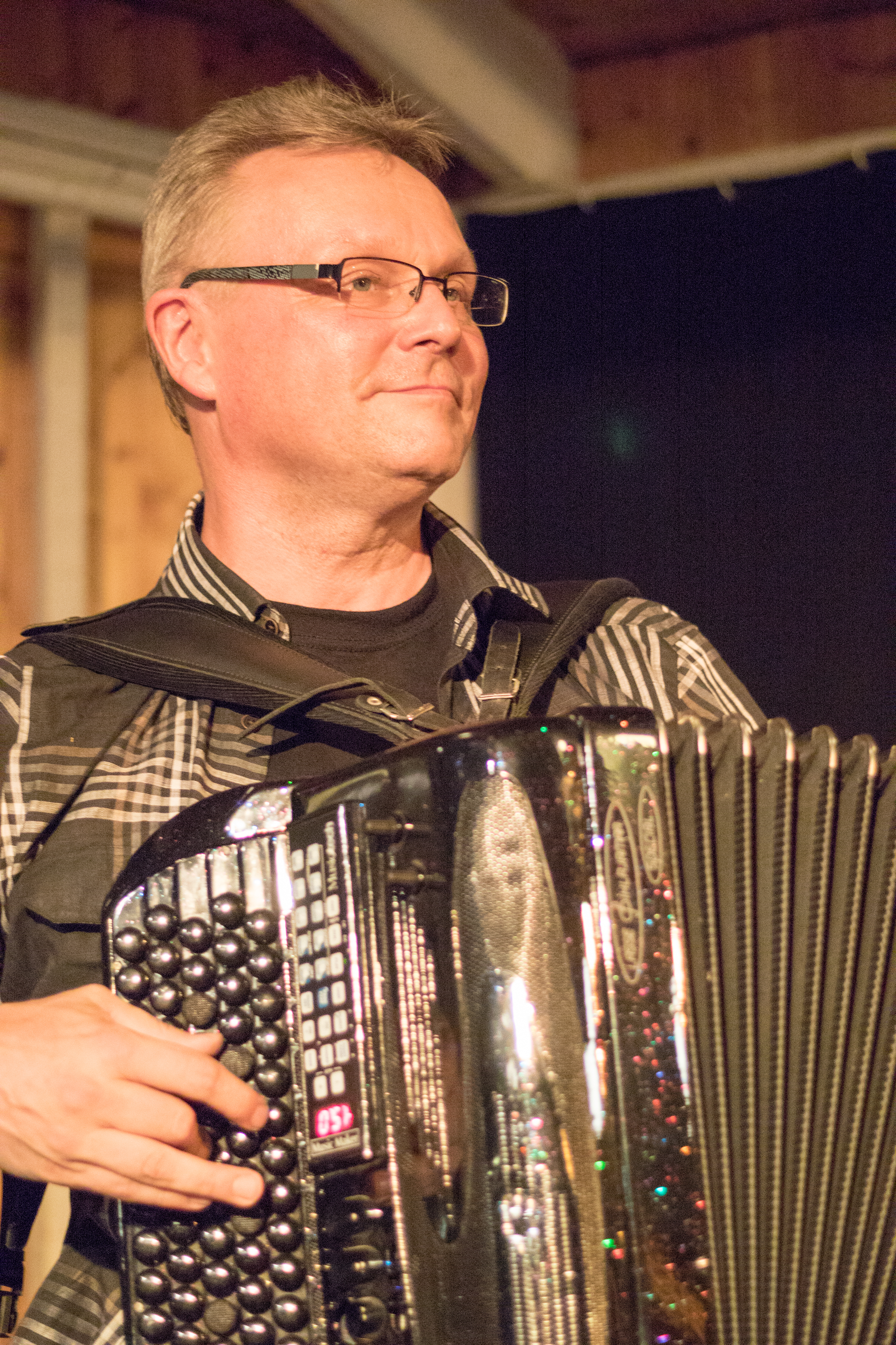 Jarmo Tinkala, suomalainen haitaristi